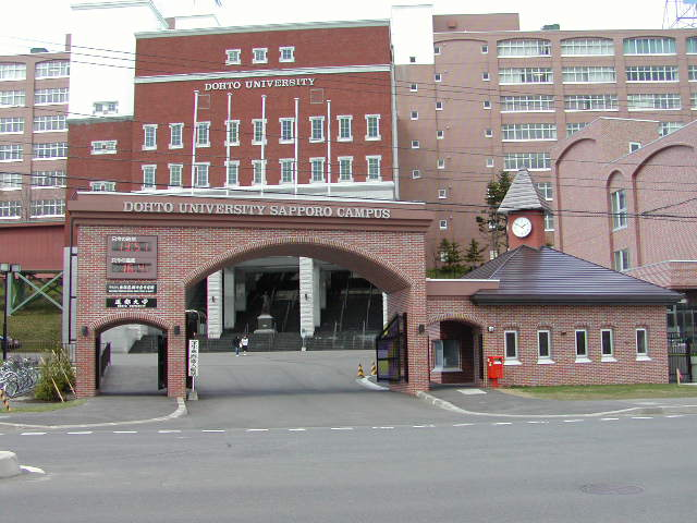 道都大学（ハマナス門） /撮影位置: 北海道ja:北広島市、道都大前。 /撮影日: 2005年 /撮影者: ペスキス /画像形式: JPEG形式・640x480ピクセル・色数70bit。